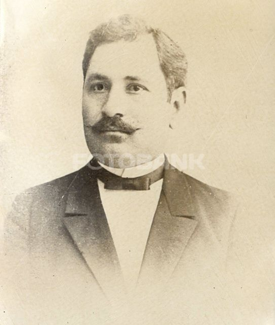 Əlisgəndər Cəfərzadə